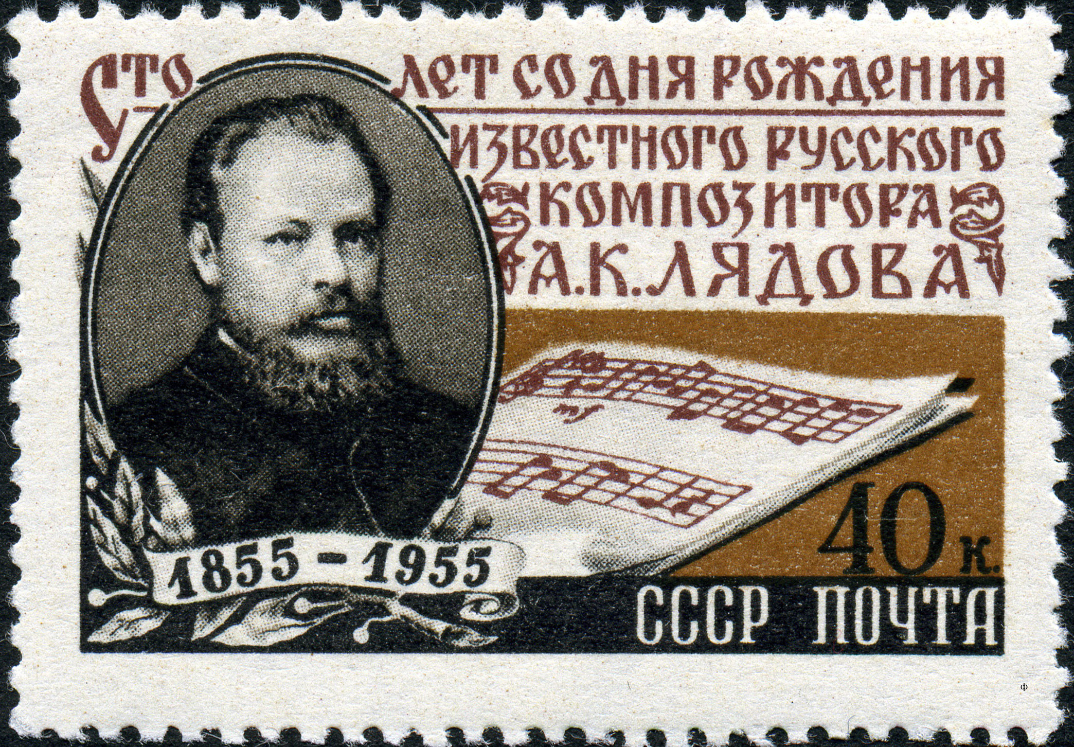 Почтовая марка СССР «100-летие со дня рождения композитора, музыкального педагога и дирижера А. К. Лядова (1855 — 1914)», выпущенная в июле 1955 года. На марке изображён портрет А. К. Лядова, фрагмент симфонического произведения «Восемь русских народных песен», написанного А.К. Лядовым в 1906 году. Художник — А. Завьялов. Номер (ЦФА) — 1843. Тираж — 1 млн экз.